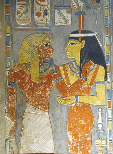 Détail de la frise du puits. Horemheb face à Hathor, l'Occidentale qui lui donne une accolade. Elle porte sur la tête l'enseigne en forme de faucon, symbole de l'Ouest. Horemheb a été le dernier pharaon de la XVIIIème dynastie. Il a rétabli le culte d'Amon en s'efforçant d'effacer toutes traces du prédécesseur de Toutankhamon, son père Aménophis IV : Akhénaton.